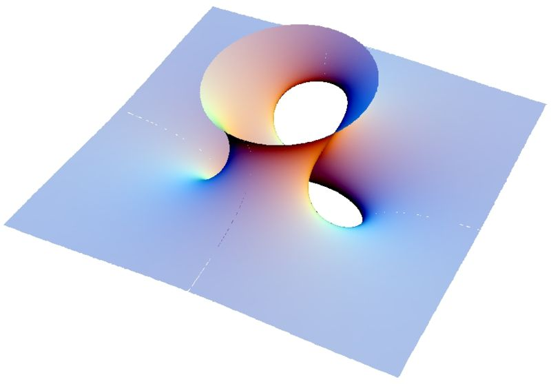 Costa_minimal_surface